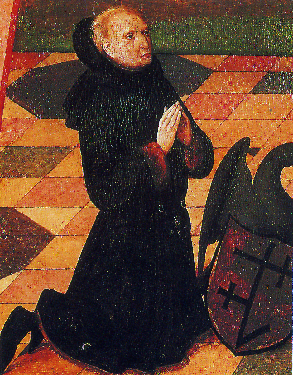 Johann Rinck, Kölner Ratsherr im 15. Jahrhundert